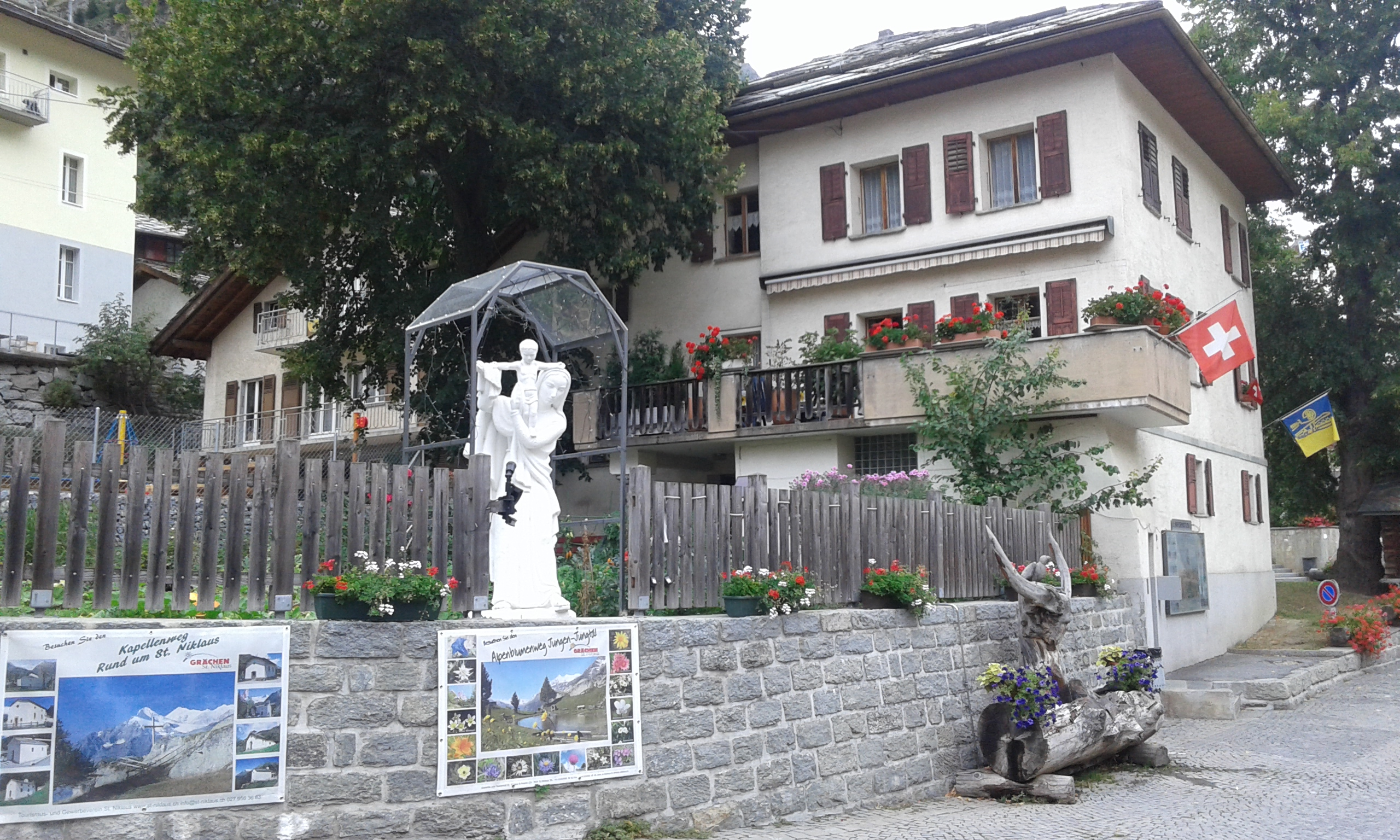 Das Pfarrhaus der Pfarrgemeinde St. Niklaus VS, Wallis, Schweiz, wurde im Jahre 1735 erbaut.